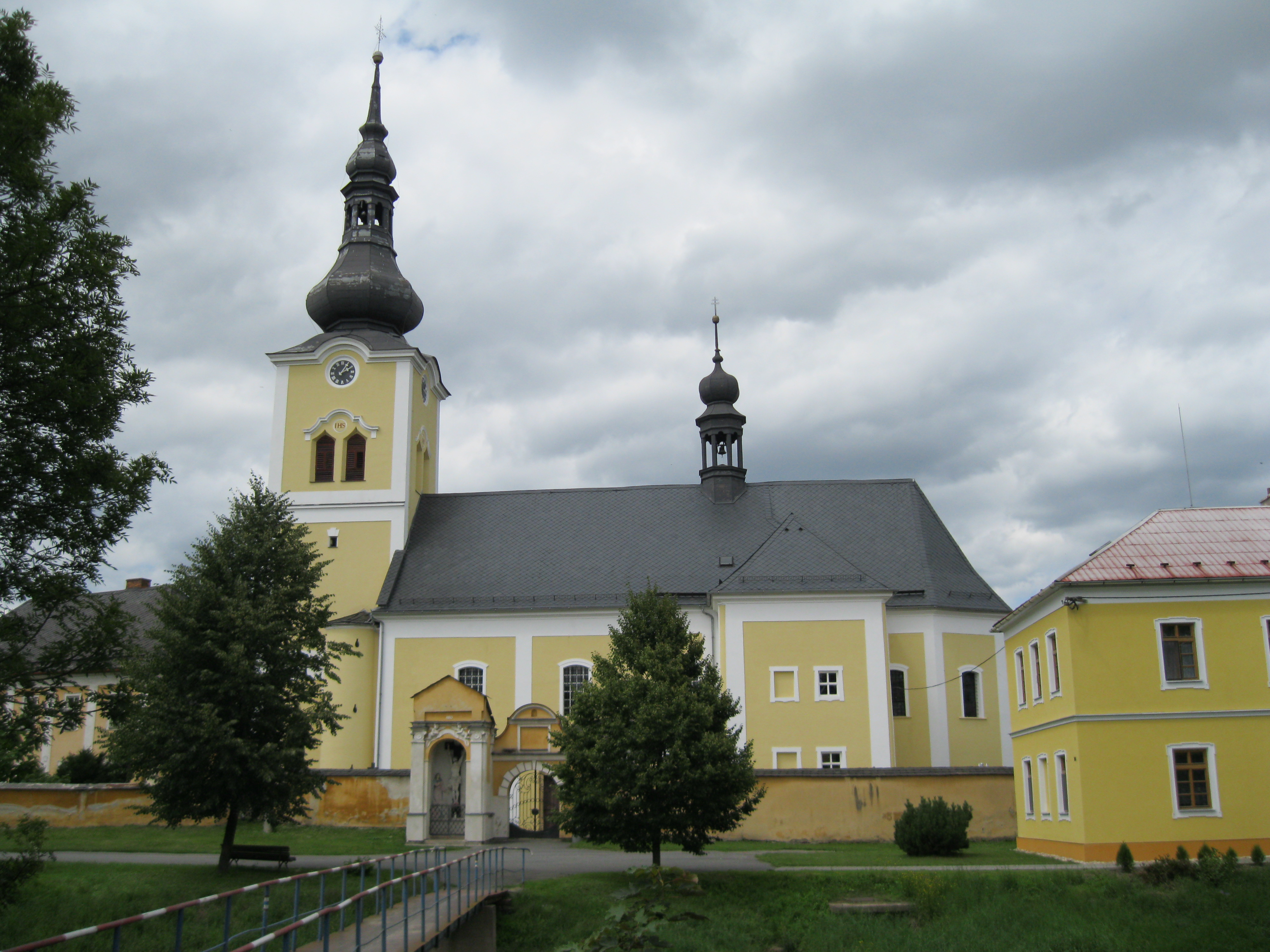 Kostel sv. Jiří s kaplemi, školou a farou (Moravičany)